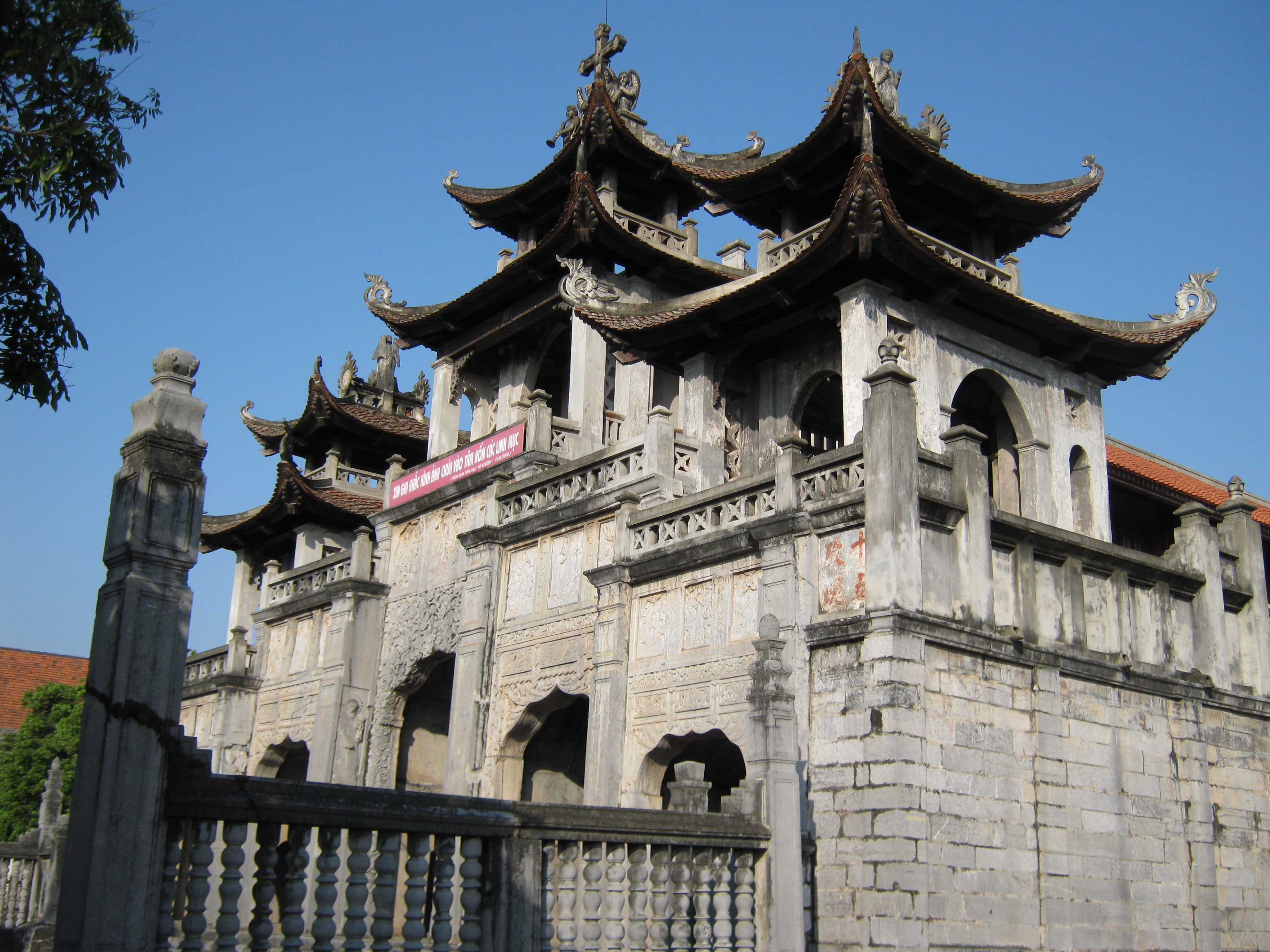 Phát Diệm Church